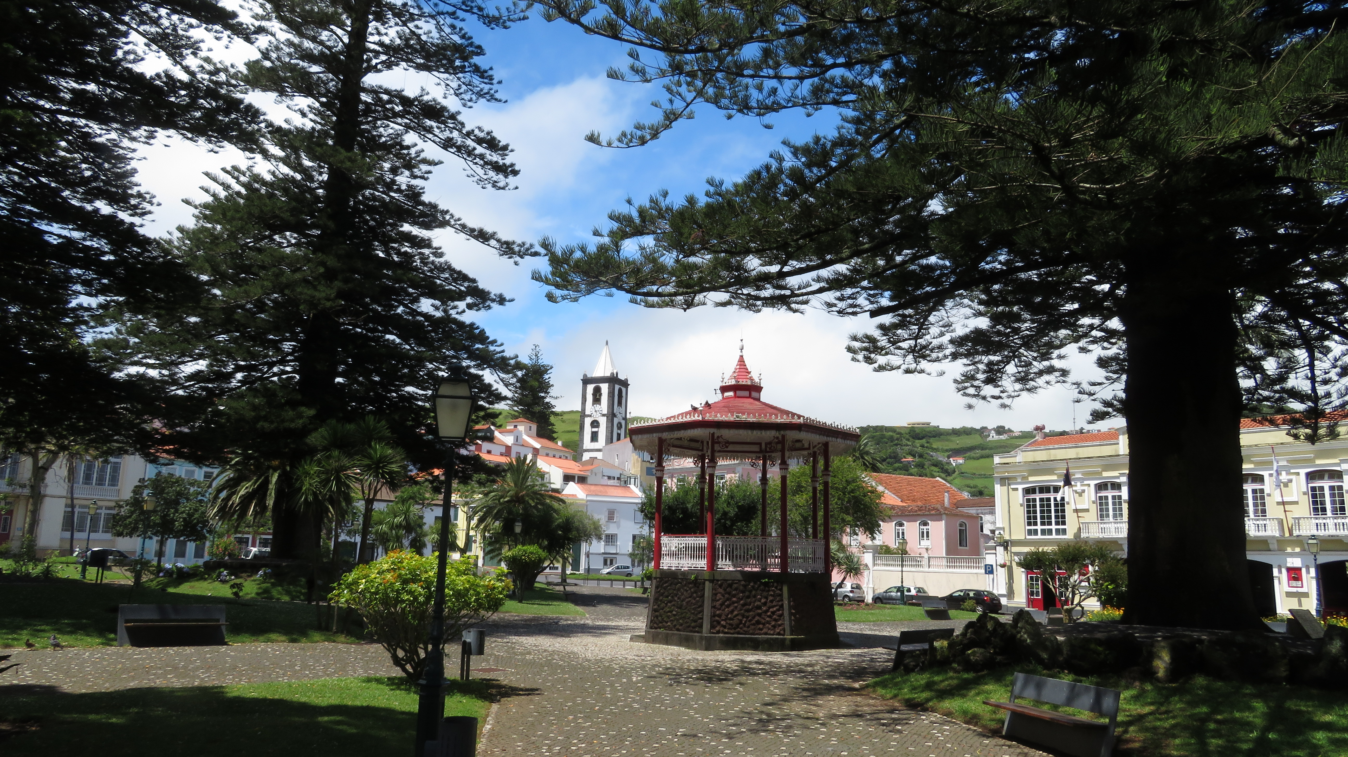 Parkanlage auf dem Platz "Pr. da Républica", Horta, Insel Faial, Azoren, Portugal